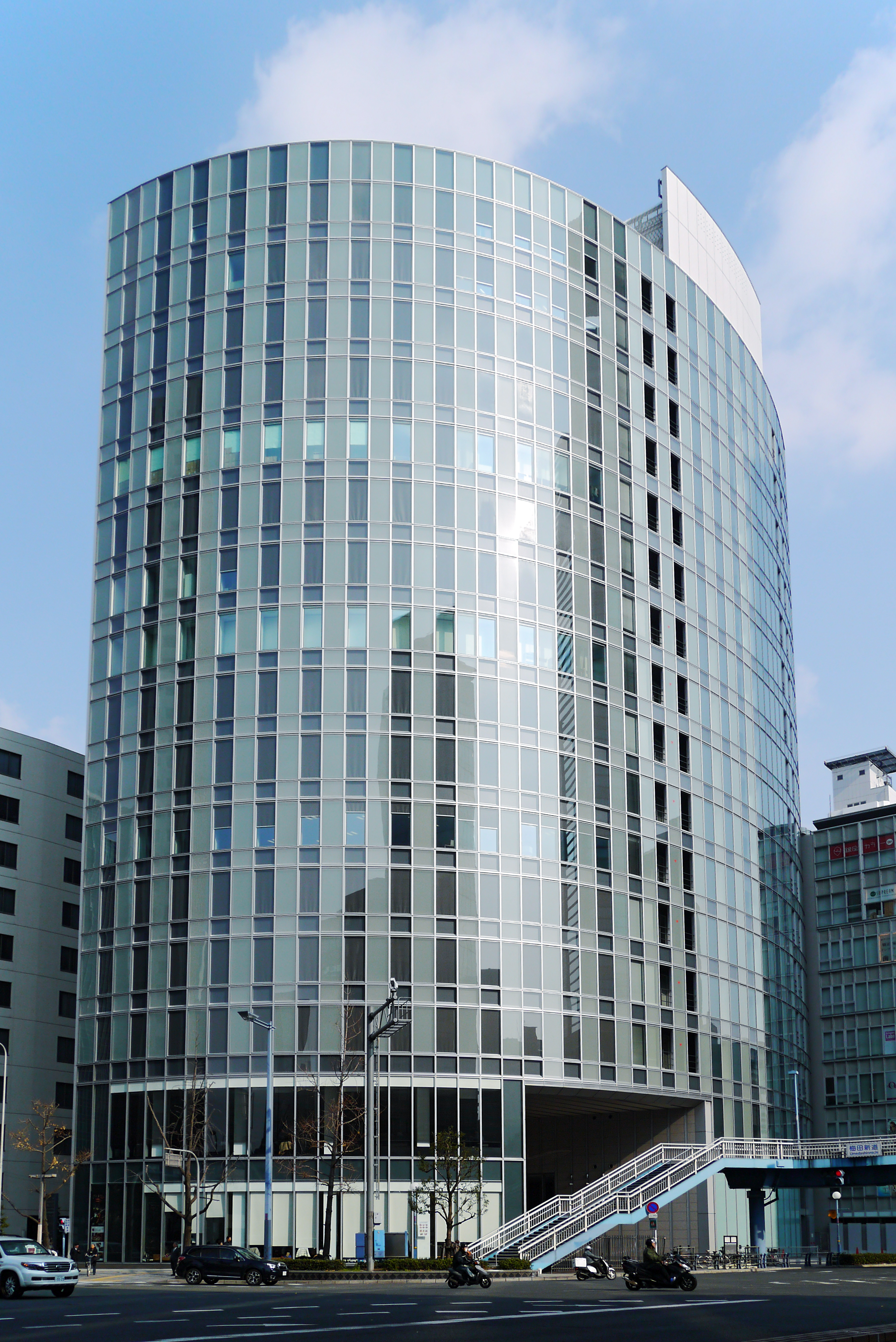 Umeshin Dai-ichi Seimei Building (梅新第一生命ビルディング), Osaka, Osaka prefecture, Japan